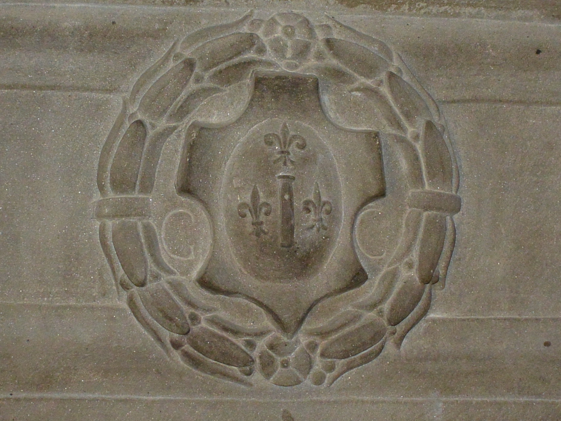 Stemma della Famiglia Cini (Giuseppe)